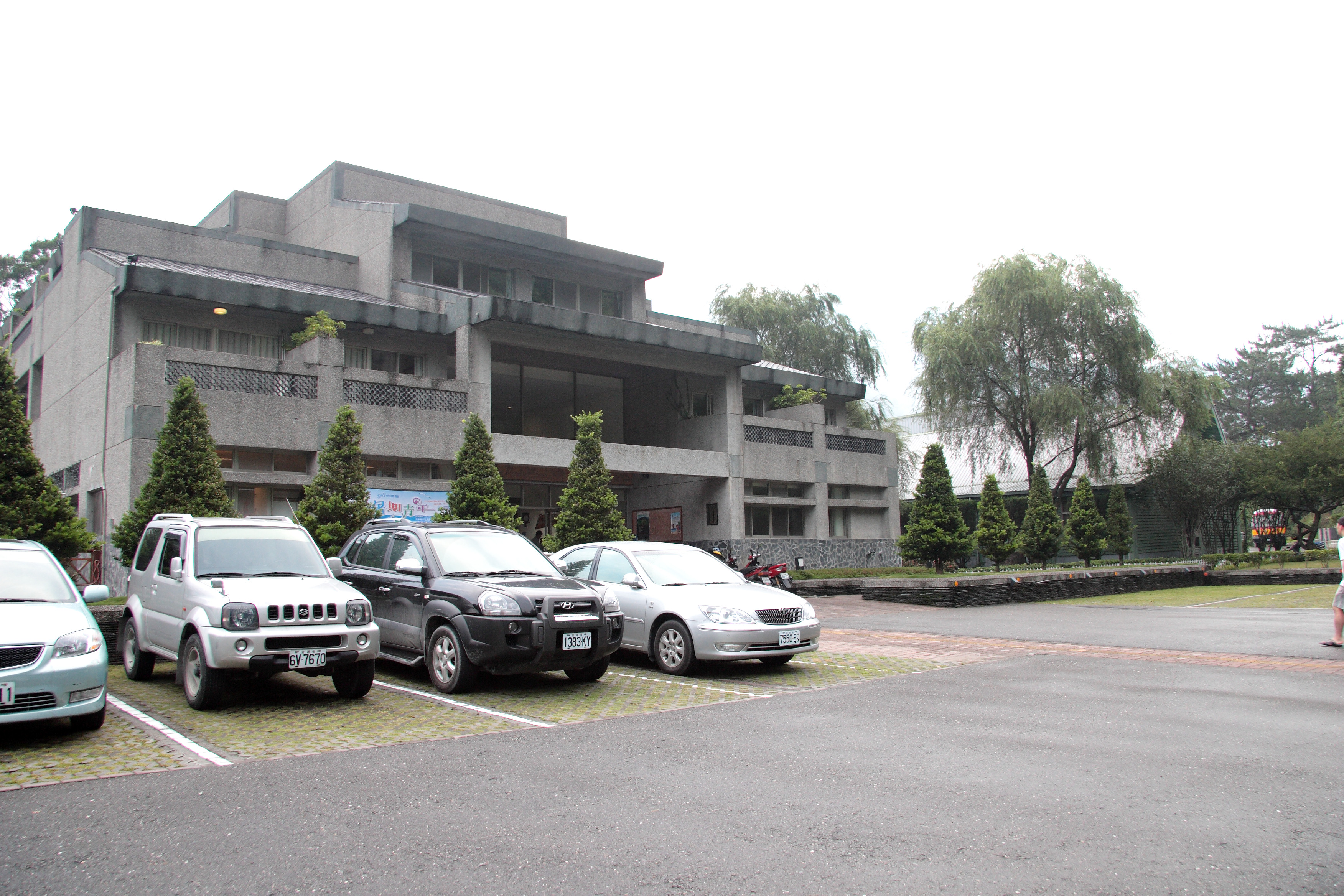 梅山山莊